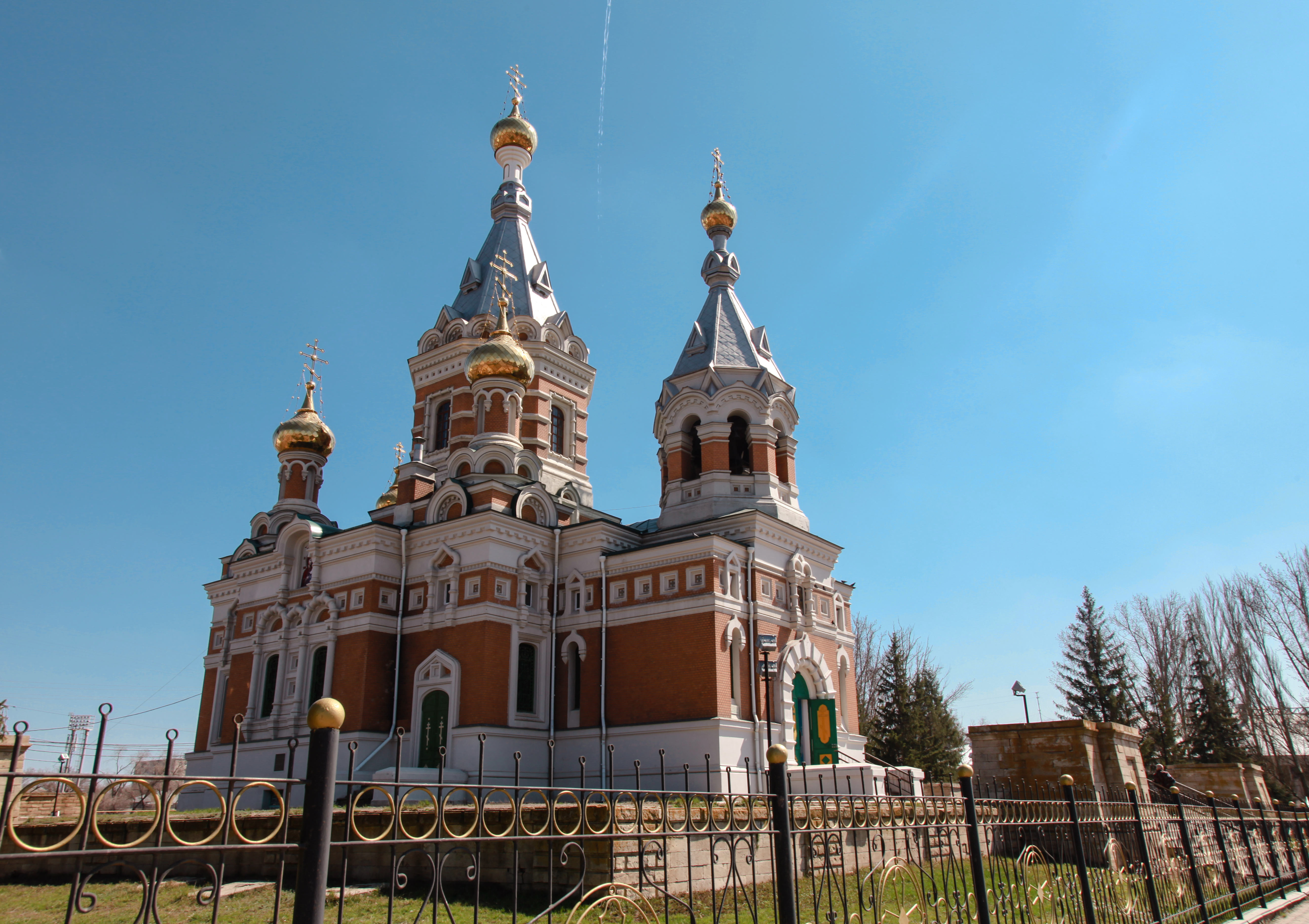 Автор: Александр Хохлачев